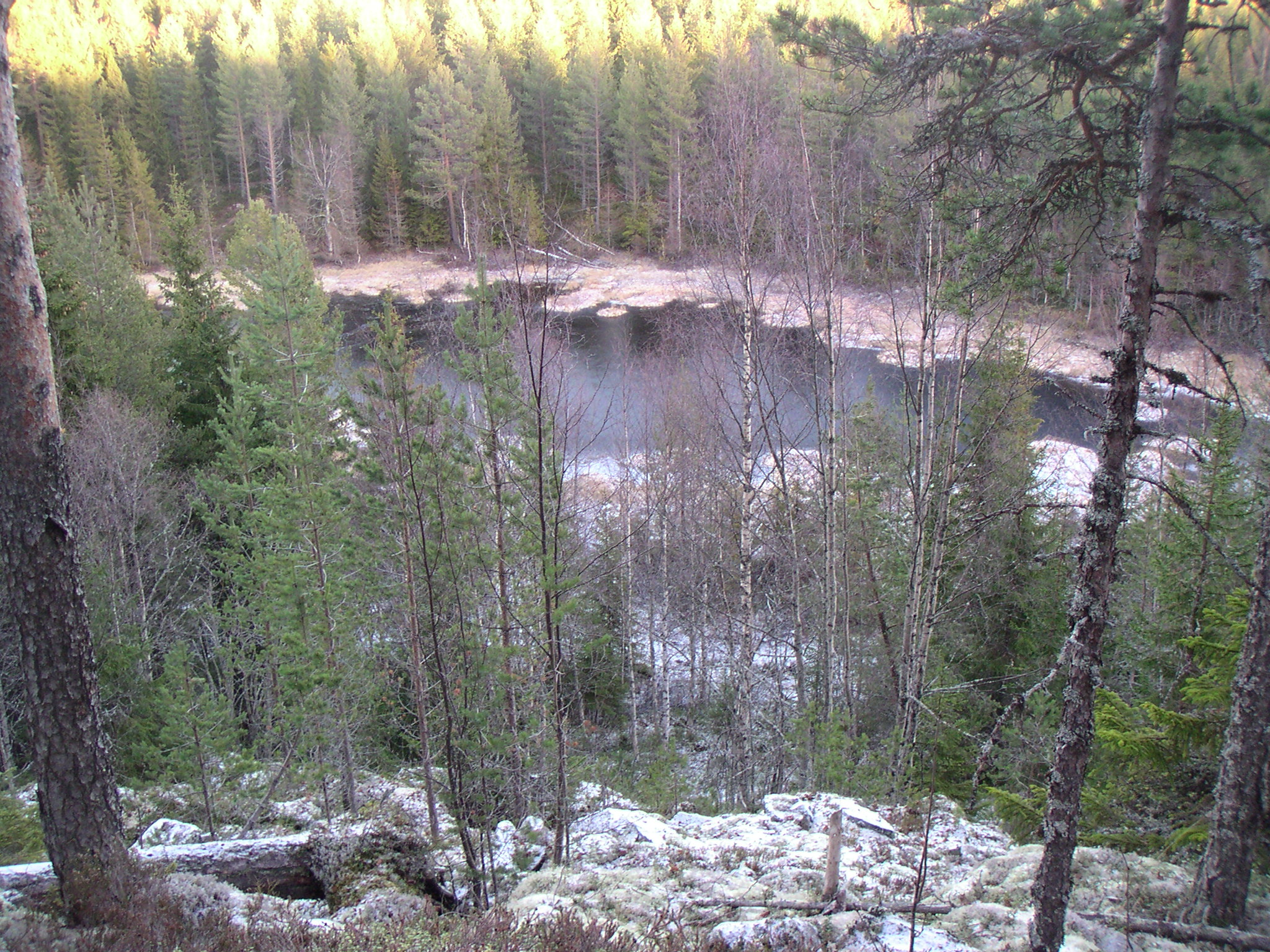 Rudtjärnen